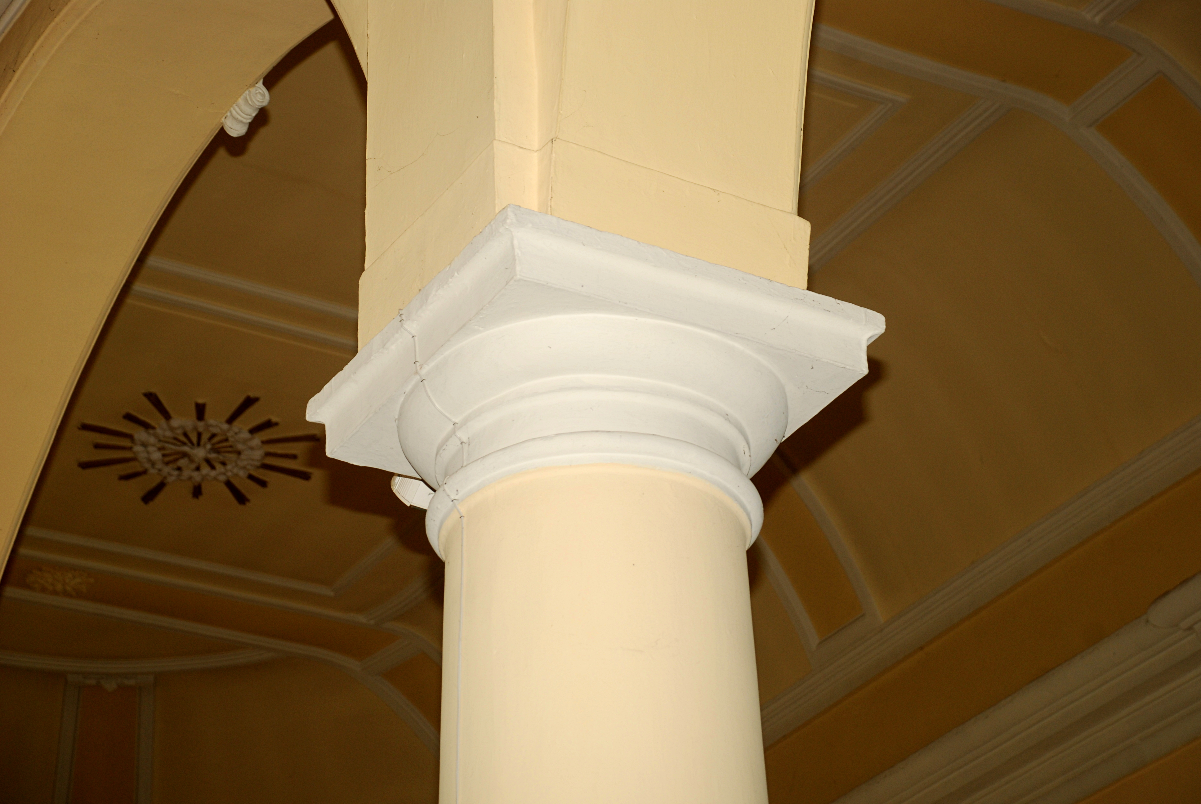 Belgique - Brabant wallon - Mont-Saint-Guibert - Église Saint-Guibert